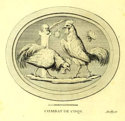 [Detail] Description des principales pierres gravées du cabinet de S. A. S. Monseigneur le duc d'Orléans, premier prince du sang (1780). In the Julius S. Held Collection of Rare Books. Sterling and Francine Clark Art Institute Library.